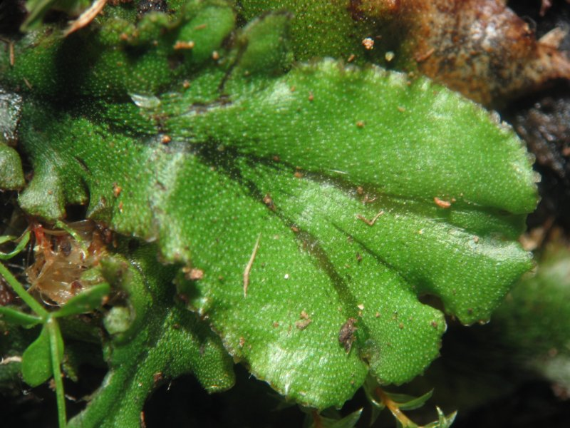 Brunnenlebermoos Marchantia polymorpha, Müritz-Gebiet